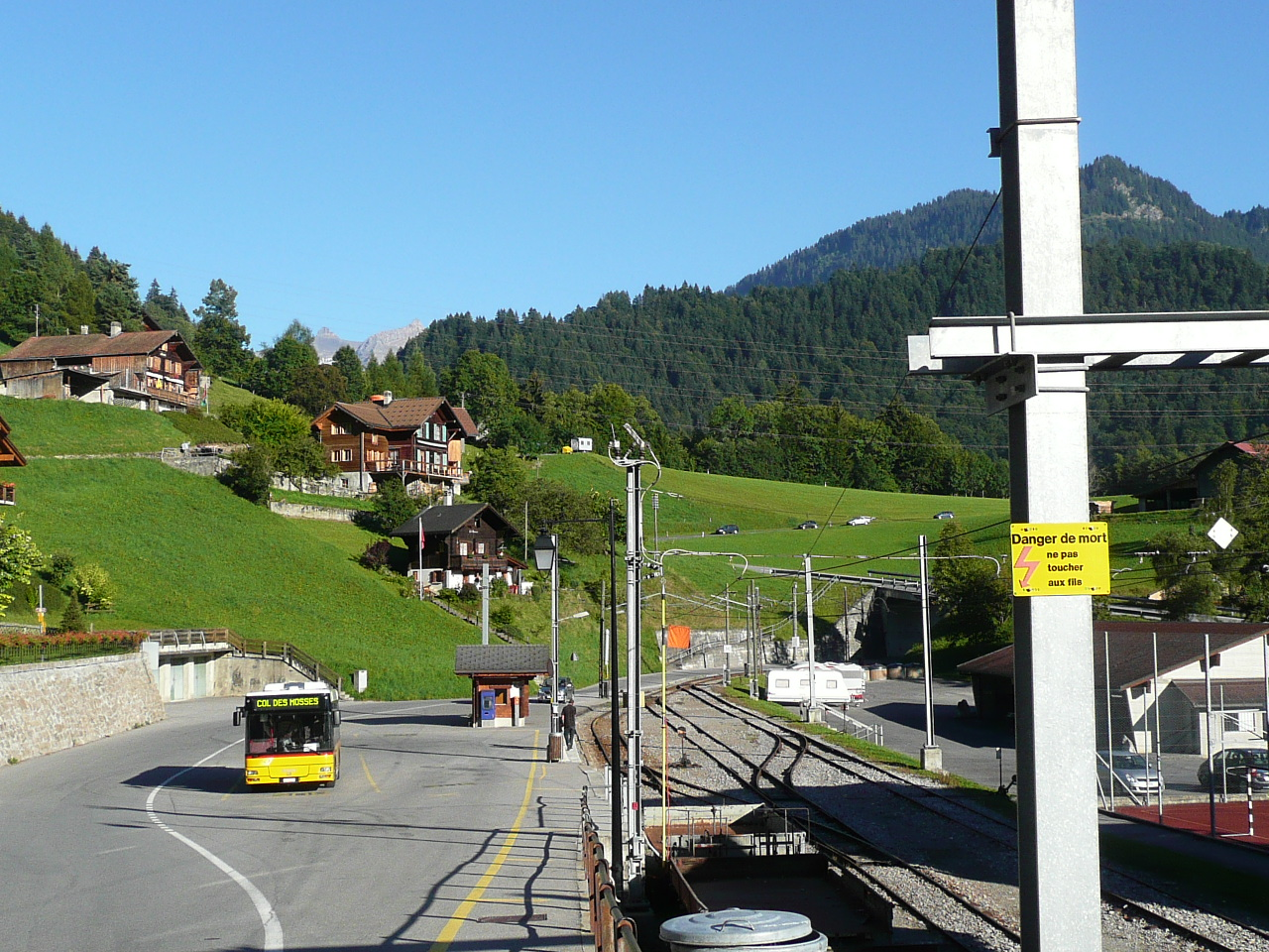 Gare de Le Sépey sur la ligne de Chemin de fer Aigle-Sépey-Diablerets et le bus du Col des Mosses